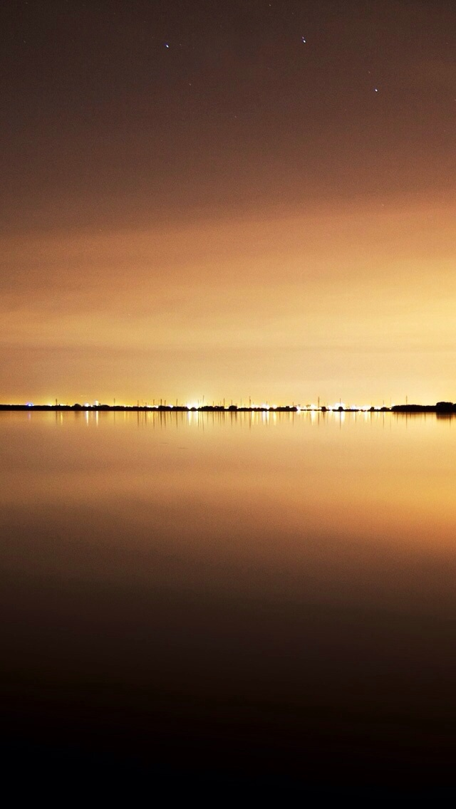 澳门傍晚一角的景色